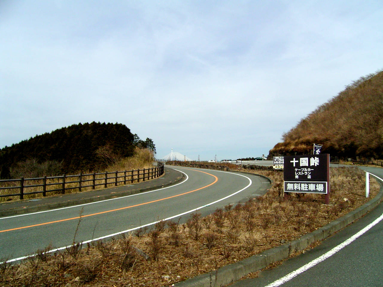 静岡県道20号十国峠付近